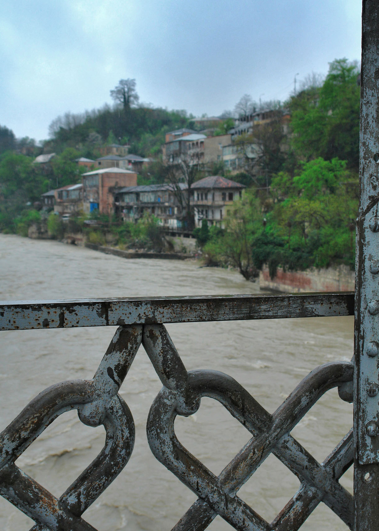 Kutaisi, chain bridge Georgia